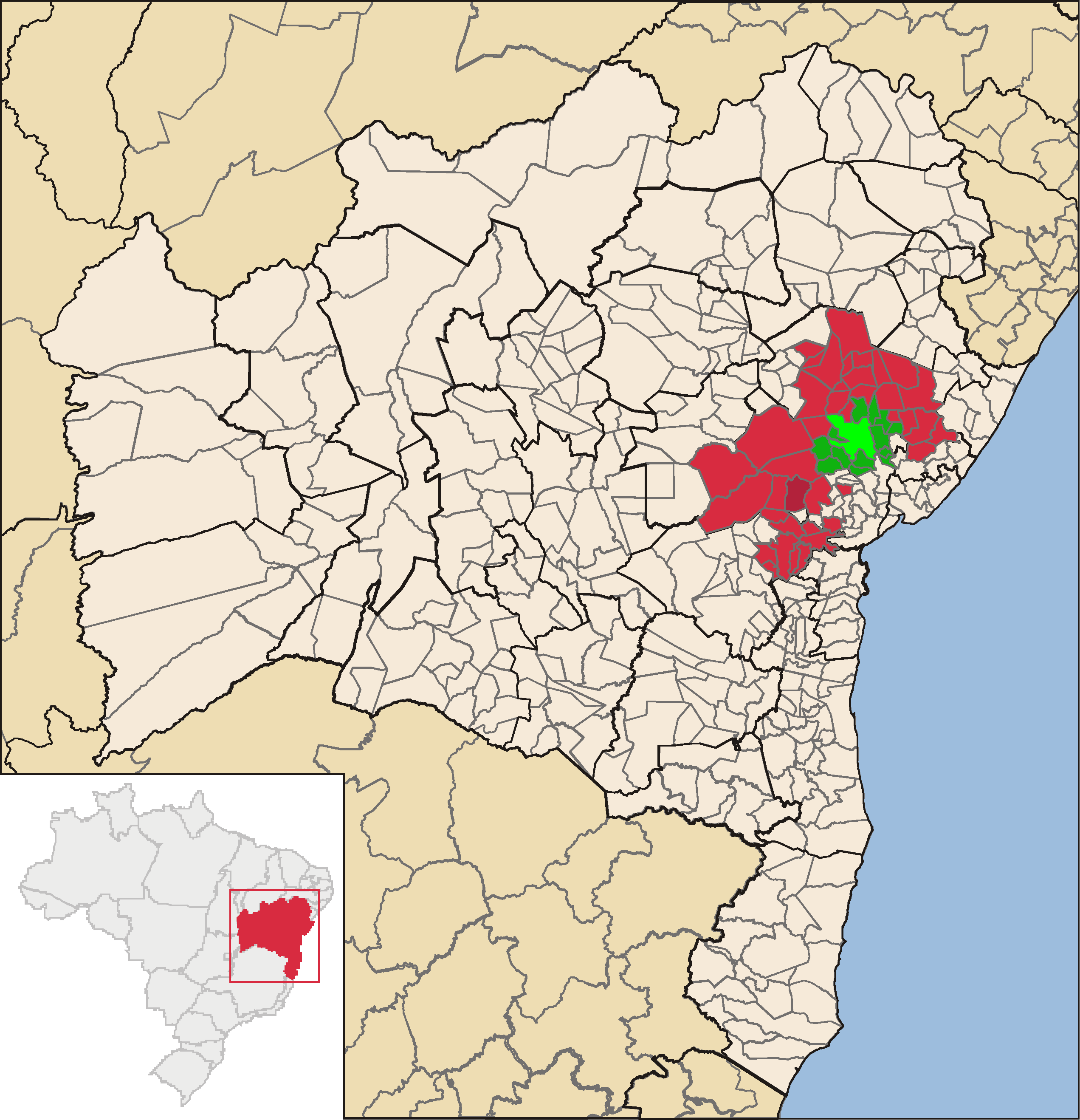 Região de cobertura da TV Subaé. Município de concessão (Feira de Santana) Municípios cobertos originalmente Municípios cobertos pela TV Subaé após a compra da emissora pela Rede Bahia Município não coberto anteriormente pela TV Bahia, e que também não fazia parte da cobertura original da TV Subaé (Santa Teresinha)